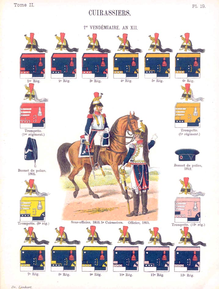 Planche 19 du tome II des « Uniformes de l'armée française », par le docteur Constant Lienhart et le professeur René Humbert. Cuirassiers 1er Vendémiaire An XII